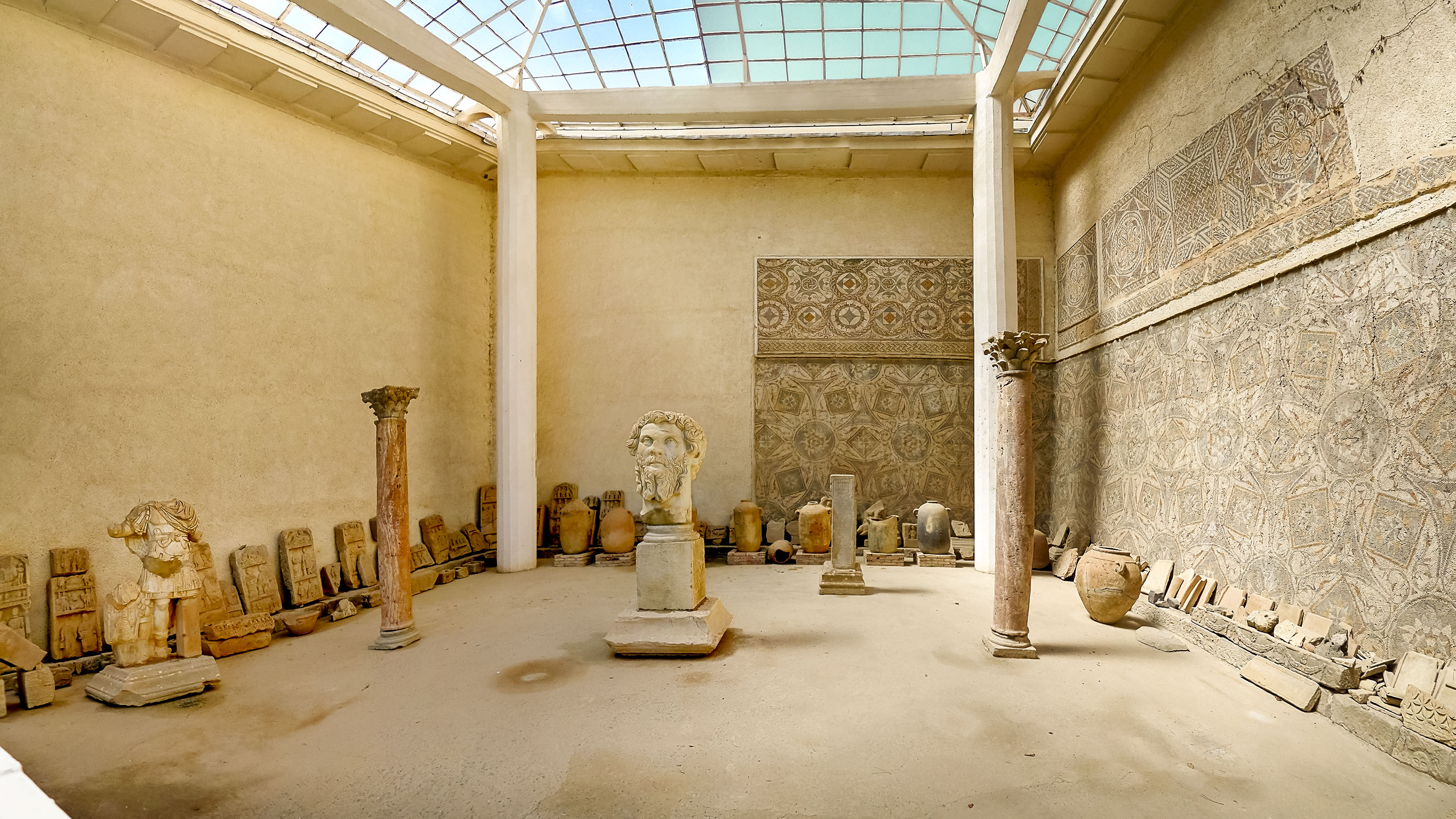 Musée de Djemila متحف جميلة Djemila, wilaya de Setif جميلة، ولاية سطيف